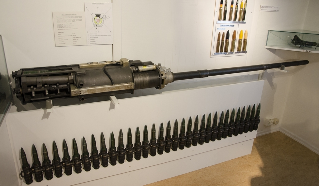 Akan m/75 30mm för Fpl37 Viggen.